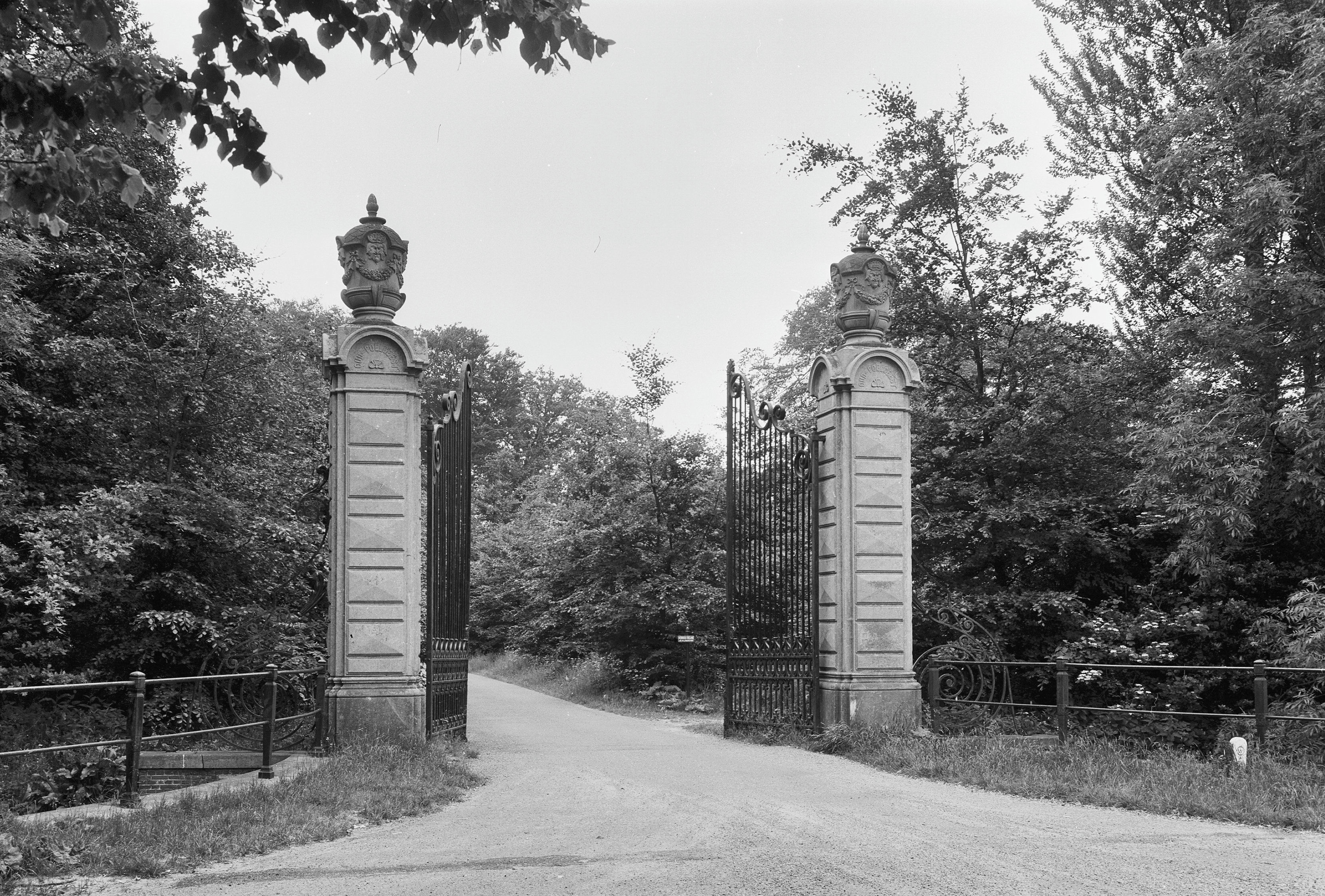 Slot Oud Poelgeest: inrijhek